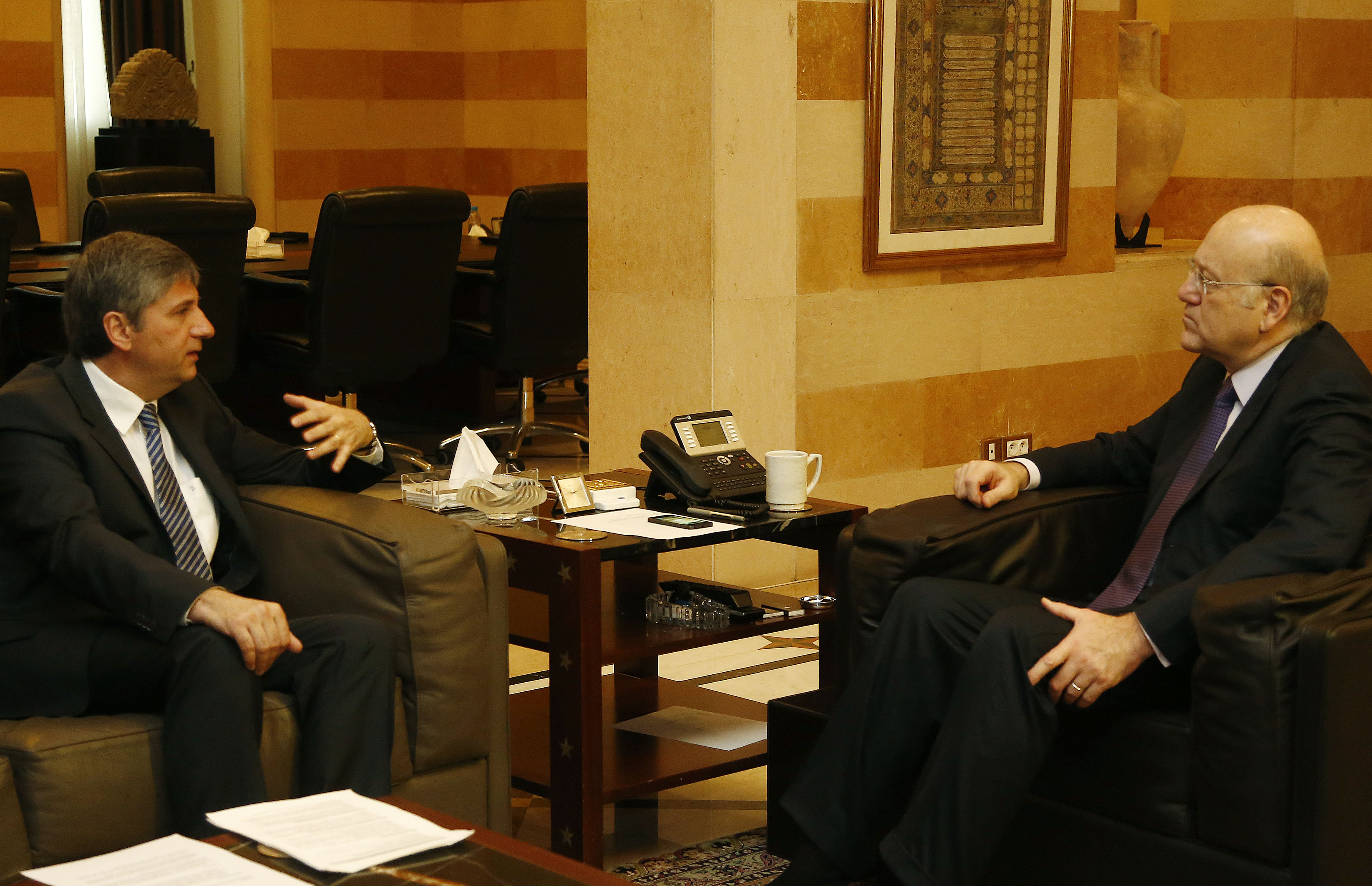 Arbeitsbesuch Libanon, Vizekanzler Michael Spindelegger trifft im Rahmen seiner Nahost-Reise den libanesischen Premier Najib Mikati in Beirut. 13.04.2013, Foto: Dragan Tatic